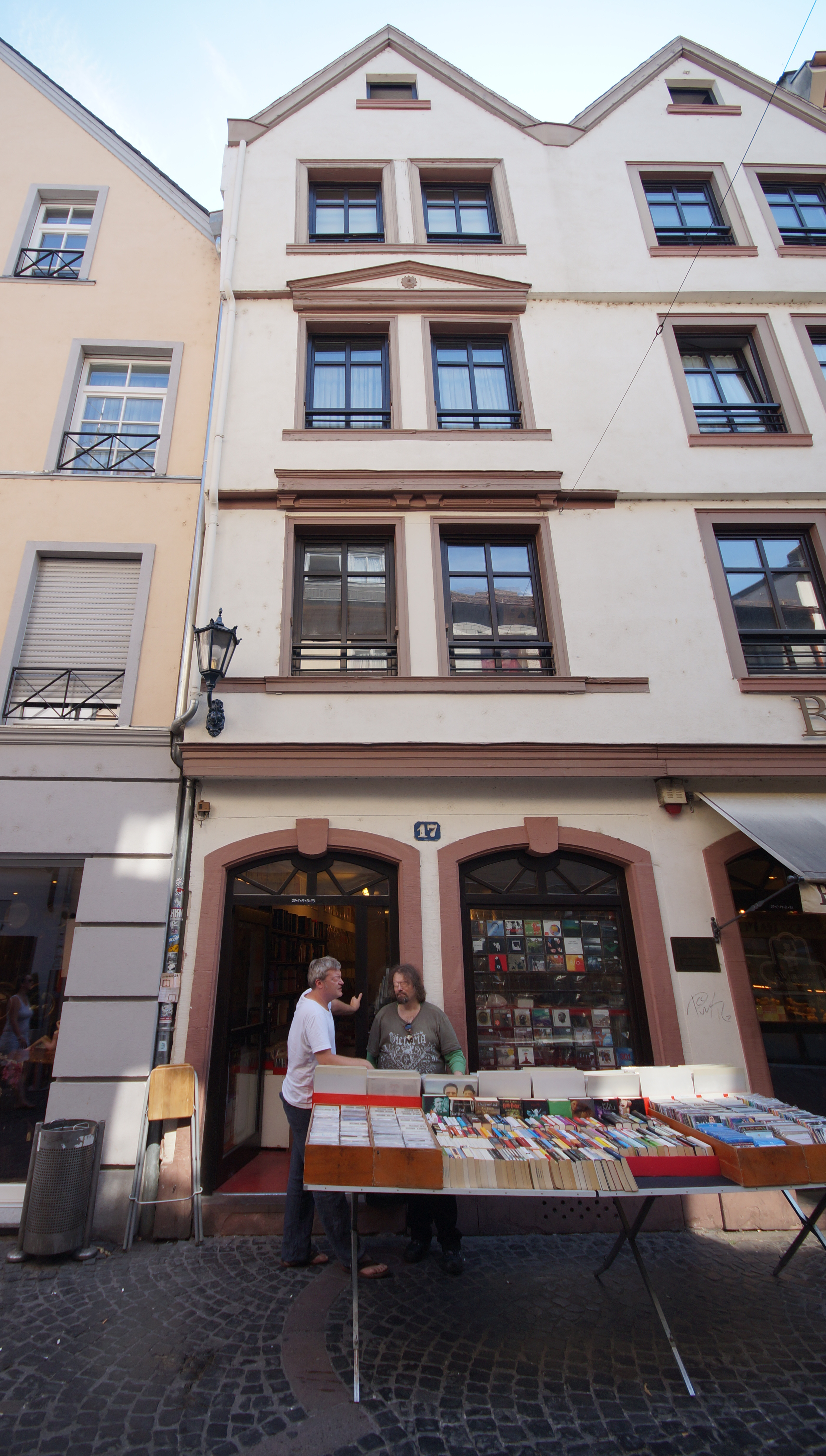 Fassade der Hausnummer 17 in der Augustinerstraße in Mainz-Altstadt